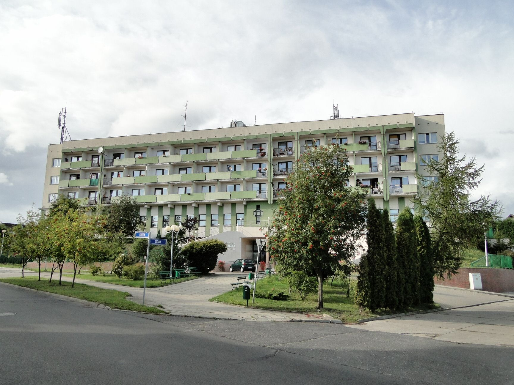 Dom Kombatanta przy ul. Kruczej w Szczecinie